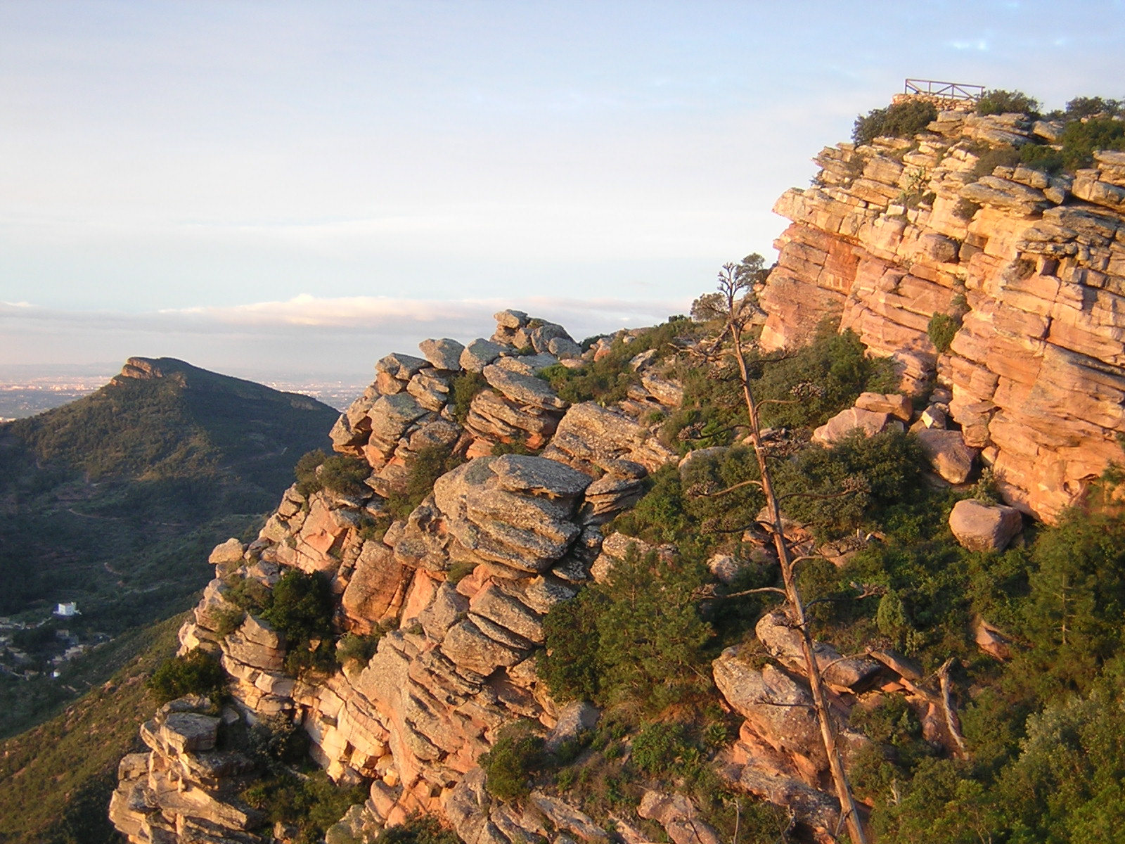 Mirador del Garbí situado en la Serra Calderona con la mola de segart al fondo, Valencia. España.